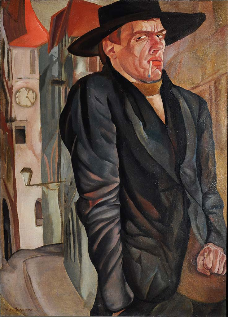 Григорьев Борис Дмитриевич (автопортрет, 1916)